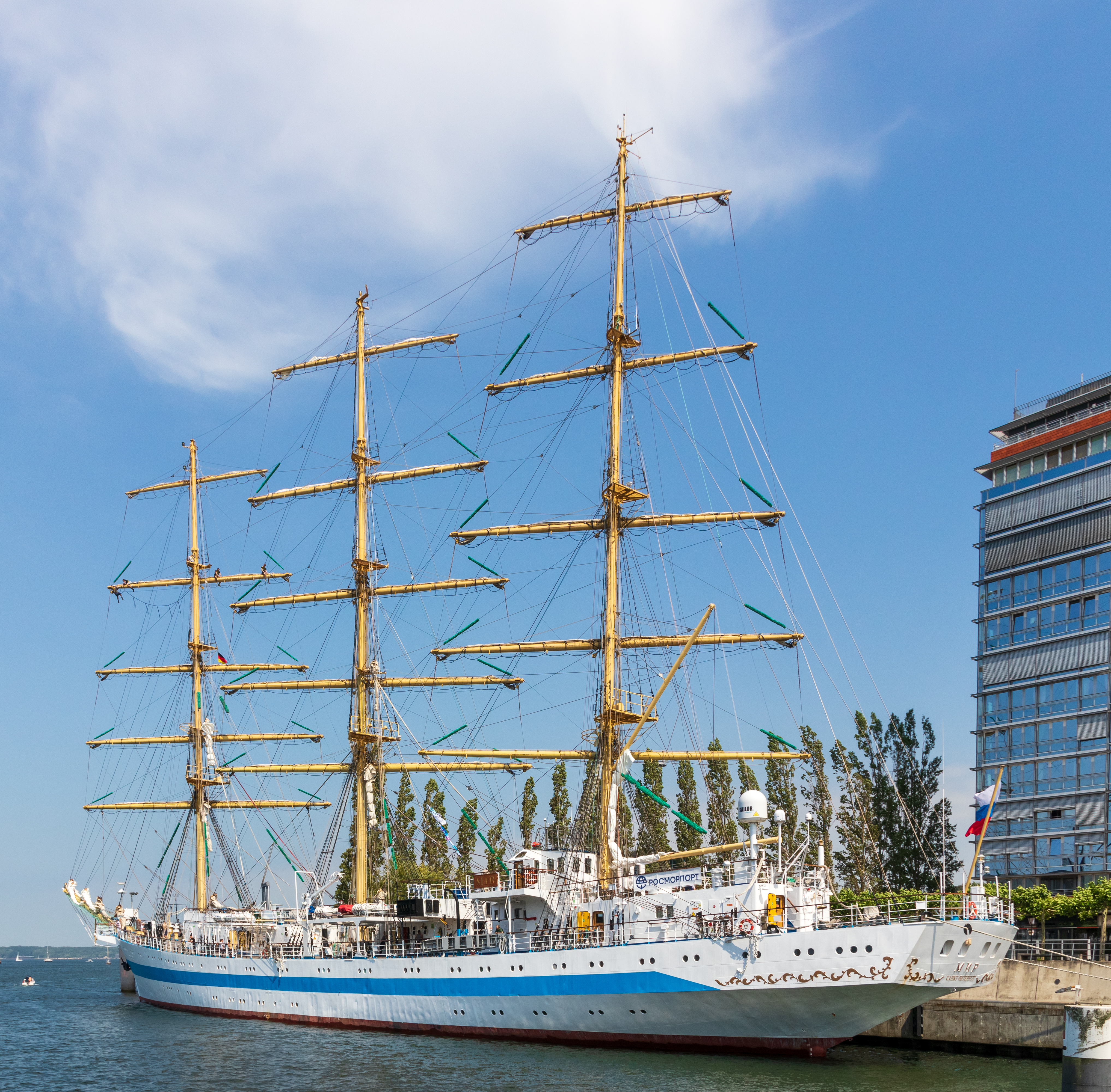 Die Mir in Kiel (Besuch anlässlich der Kieler Woche 2019)